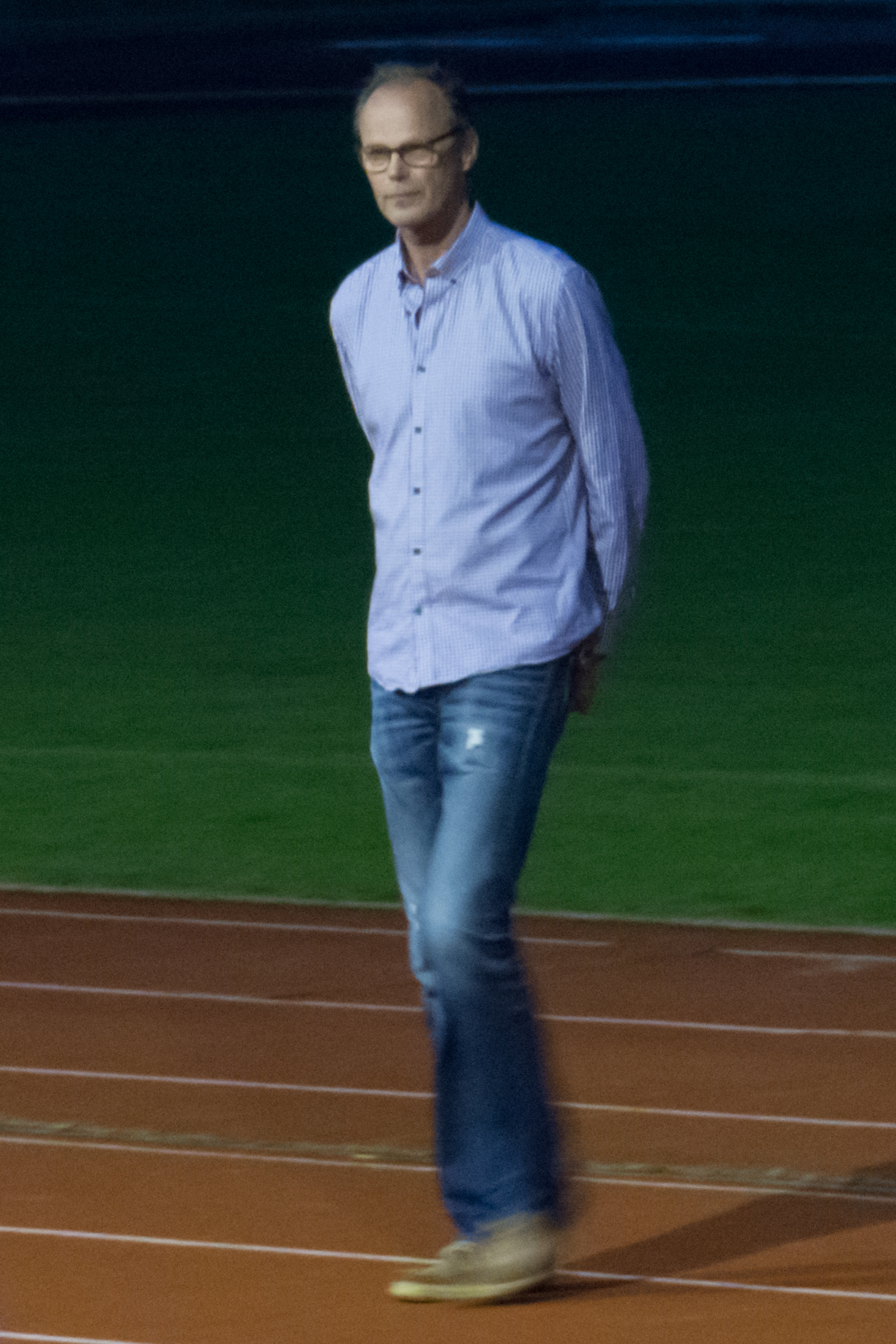 Juha Porkka, suomalainen korkeushyppääjä vuonna 2016.